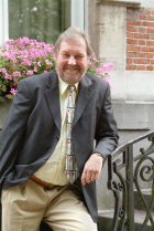 Verkiezingsfoto 2006 afgehaald op (website door mij ontwikkeld)